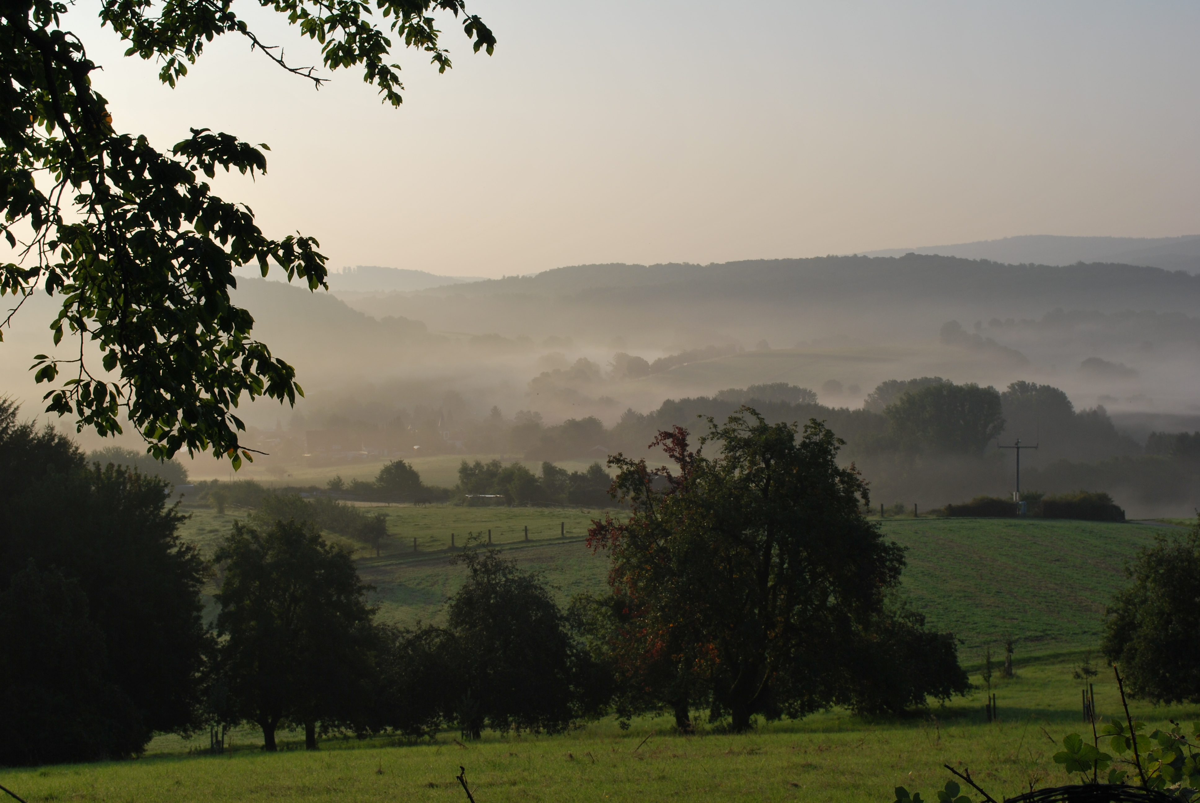 Der Odenwald ist ein romantischer Wald mit weichen Hügeln, grünen Auen, lichtdurchfluteten Wäldern und faszinierenden Felsformationen. Schutzgebiet Geo-Naturpark Odenwald-Bergstraße